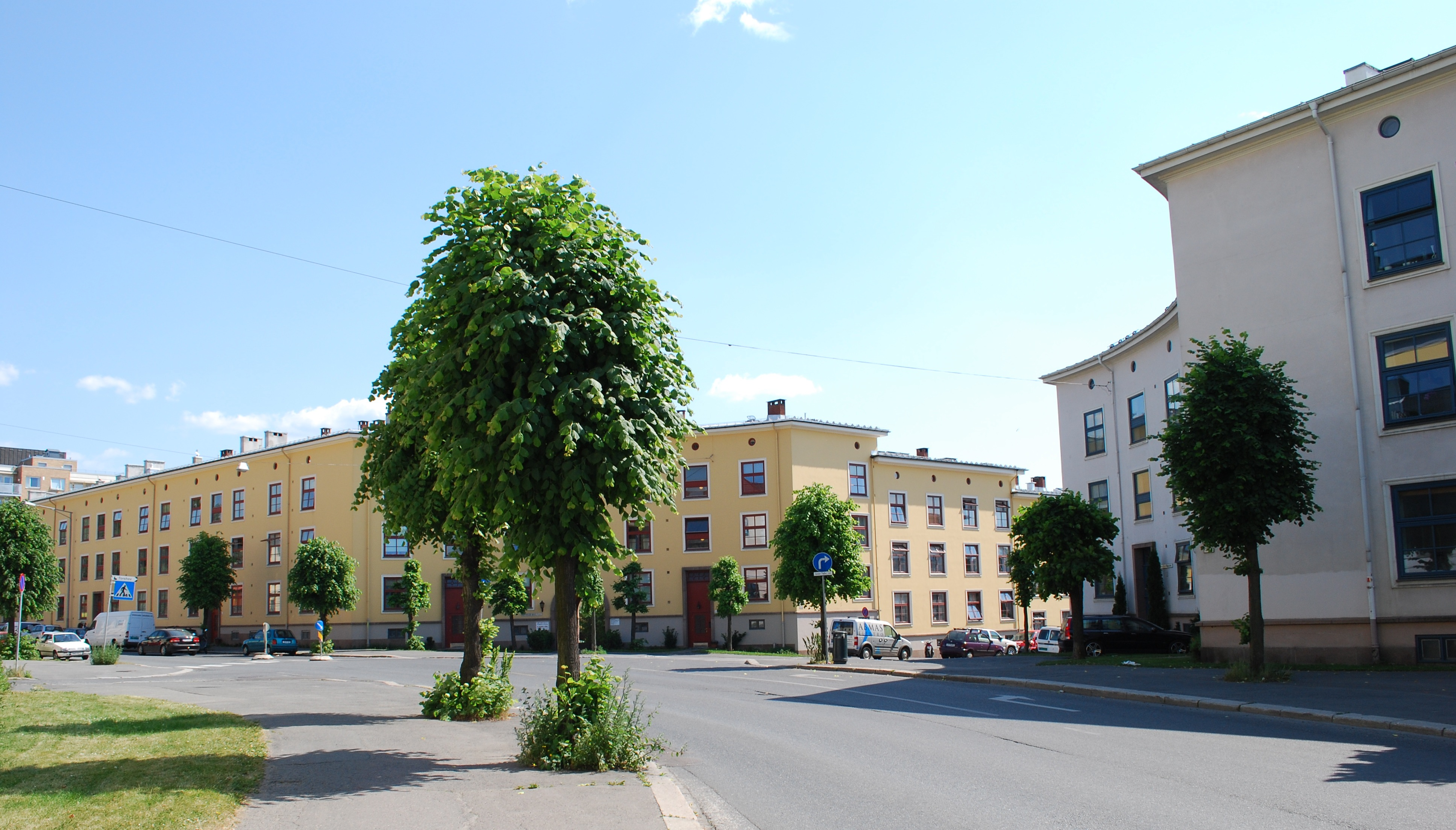 Hans Nielsens Hauges plass, sett fra Hans Nielsens Hauges gate, Nordkappgata til høyre, Sandaker, Oslo